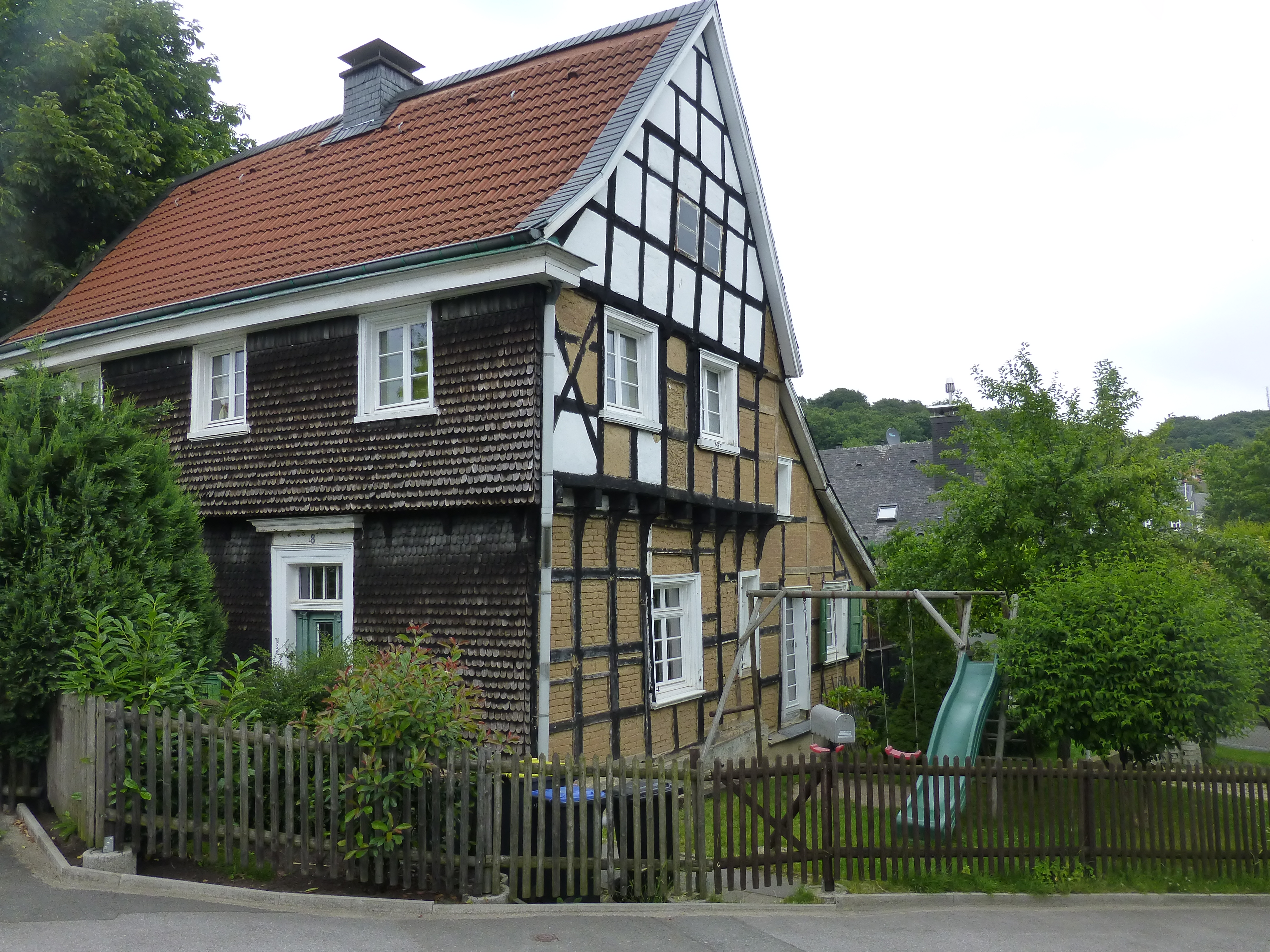 Winchenbachstraße, Wuppertal